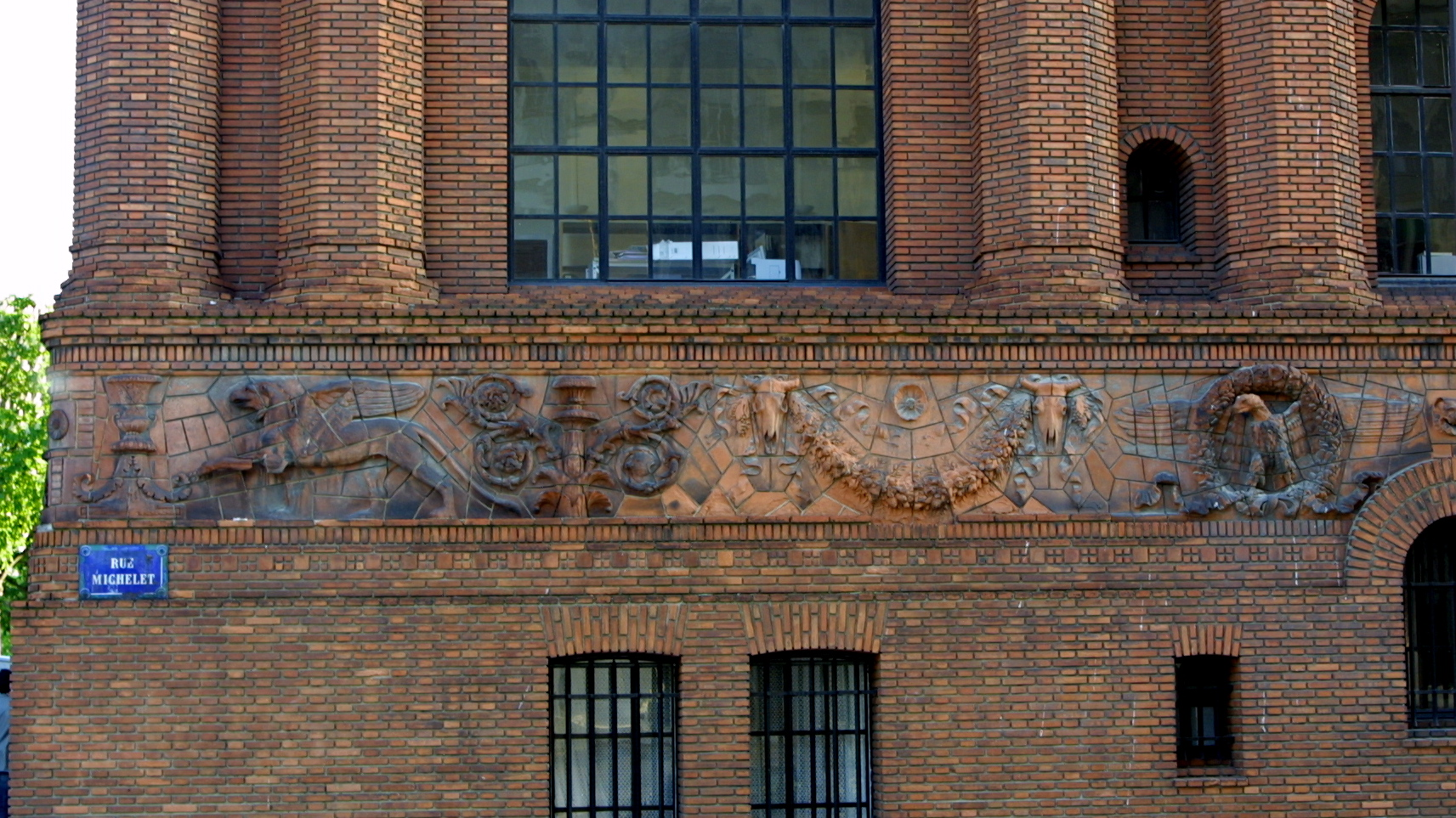 L'Institut d’Art et d’Archéologie